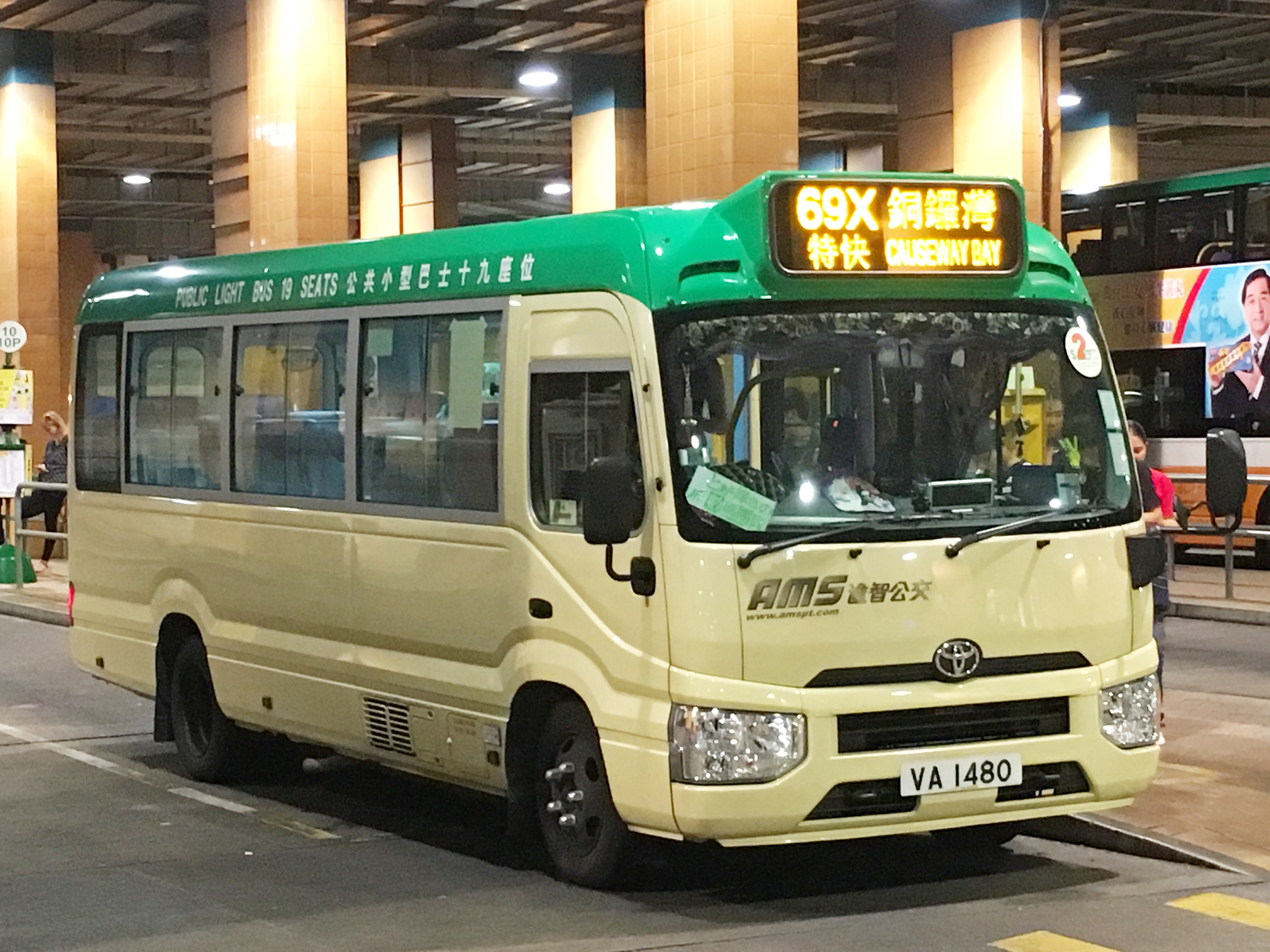 This photo is taken in Cyberport.